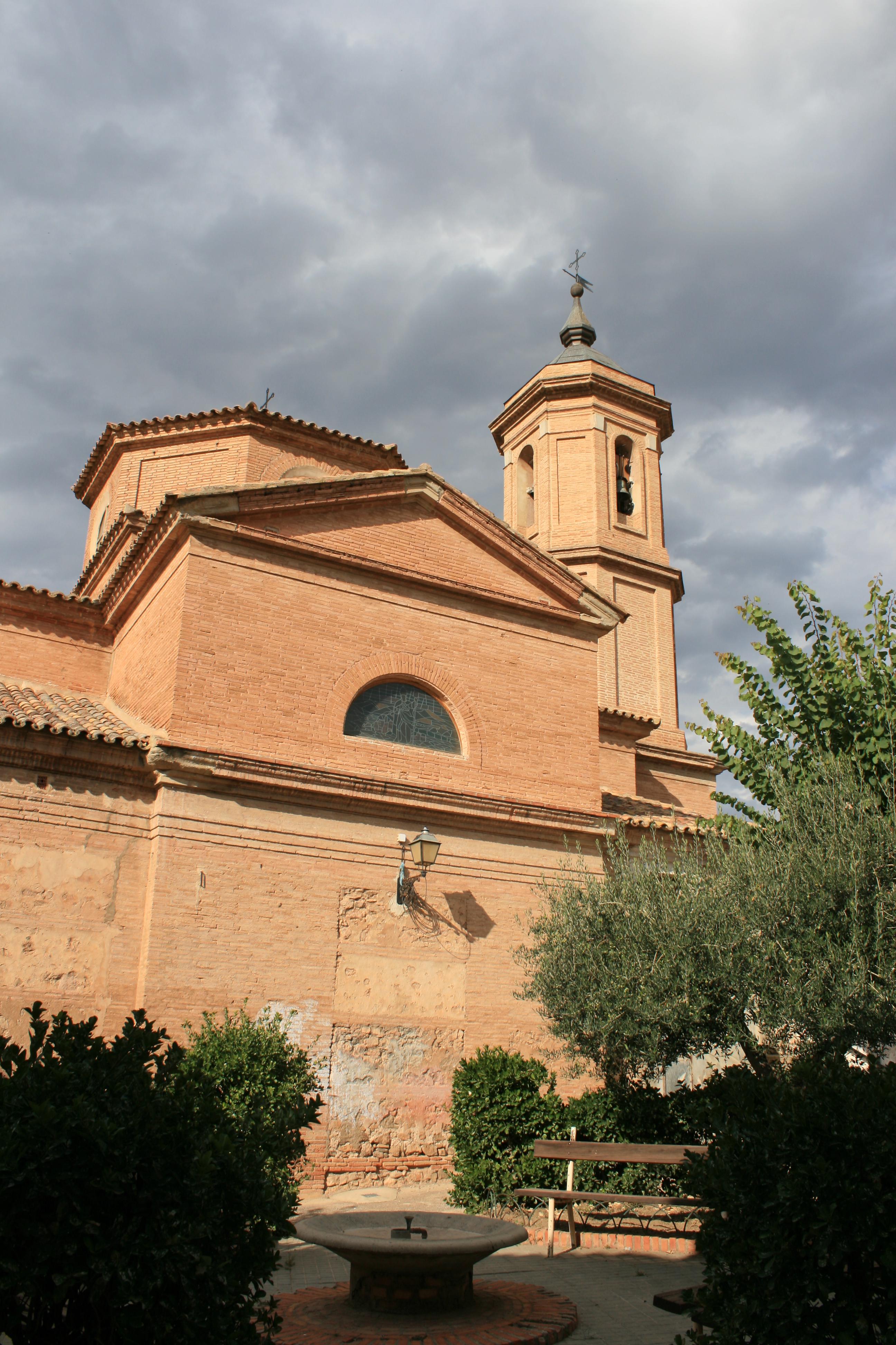 Morés